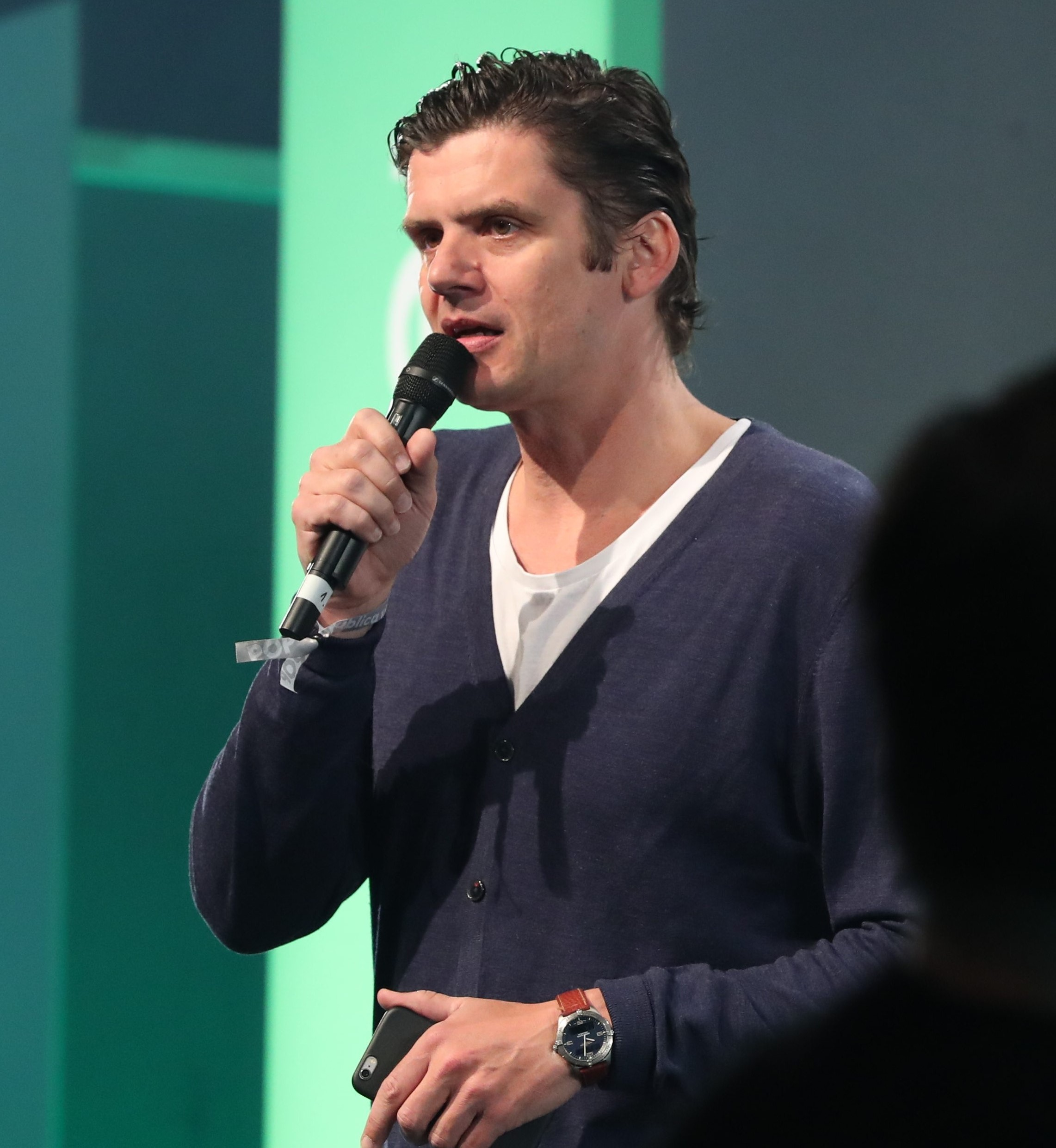 re:publica 18: Max Spallek (Host, re:publica 18)